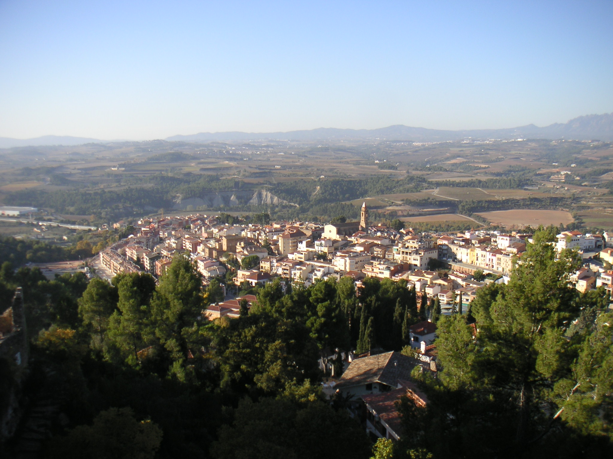 Gelida des del Castell